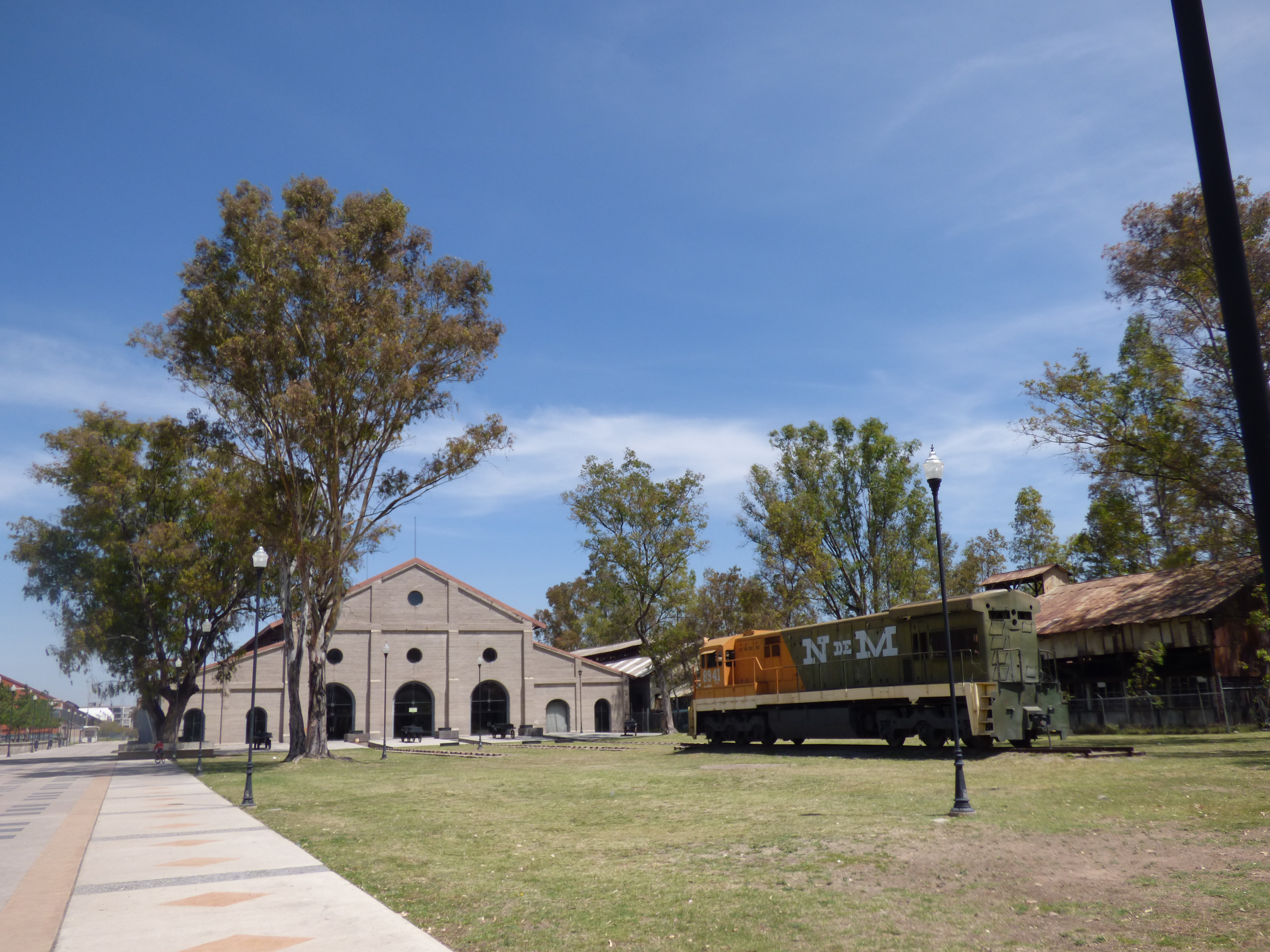 Complejo Ferrocarrilero Tres Centurias, Aguascalientes